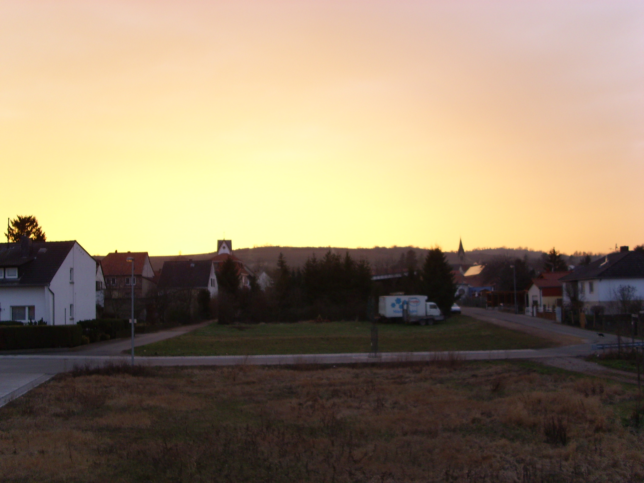 Siefersheim